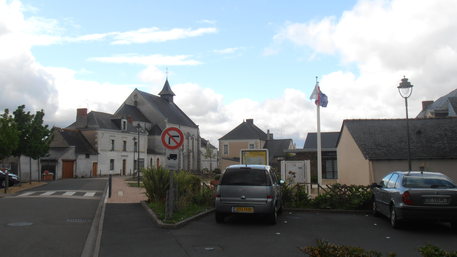 Le centre du village de Saint-Martin-du-Fouilloux (Maine-et-Loire, France).